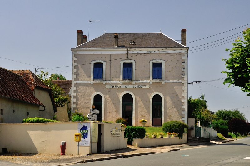 Saint-Martin-de-Lamps - Mairie